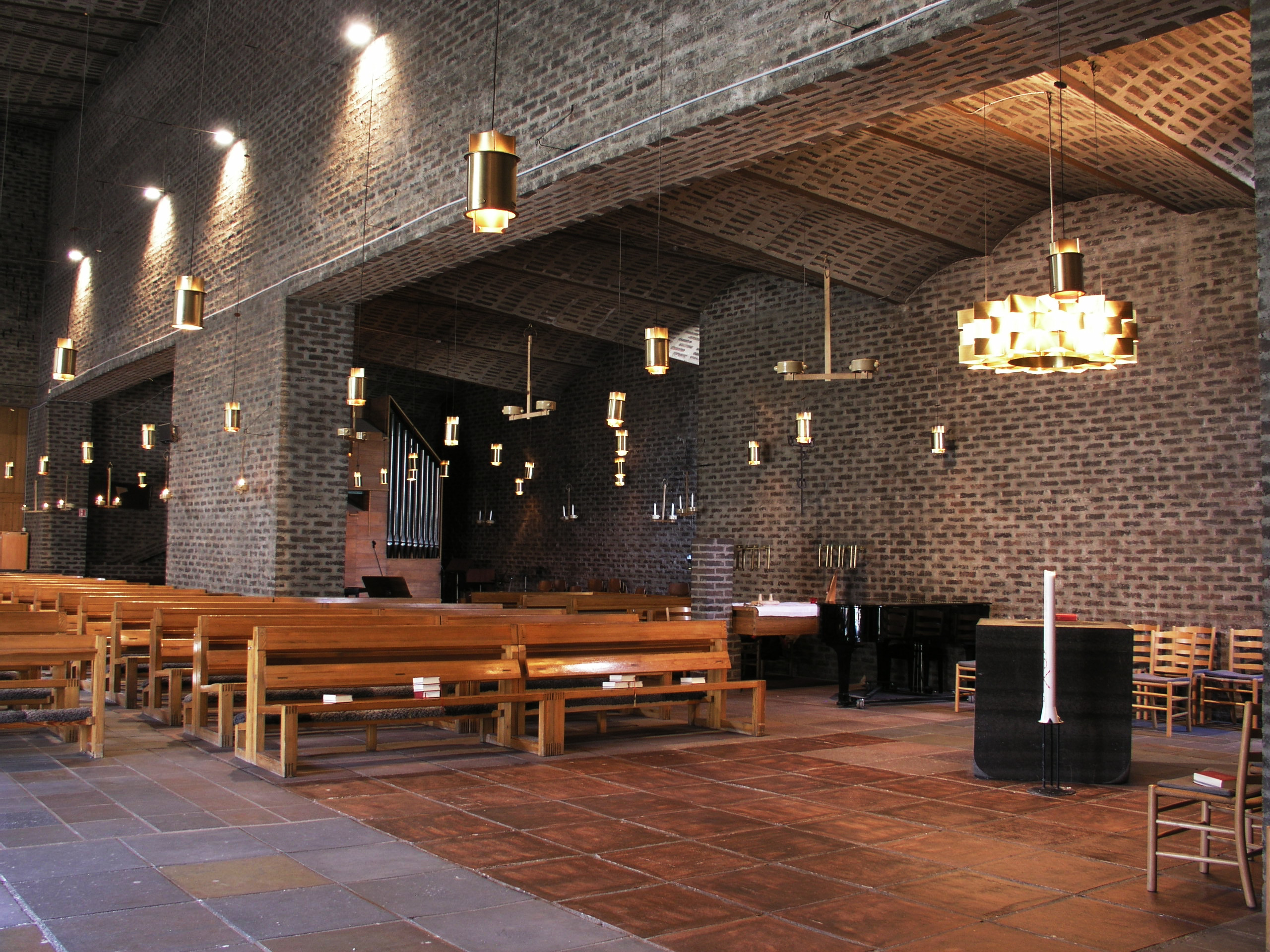 Markuskyrkan, Diocese of Stockholm, Sweden